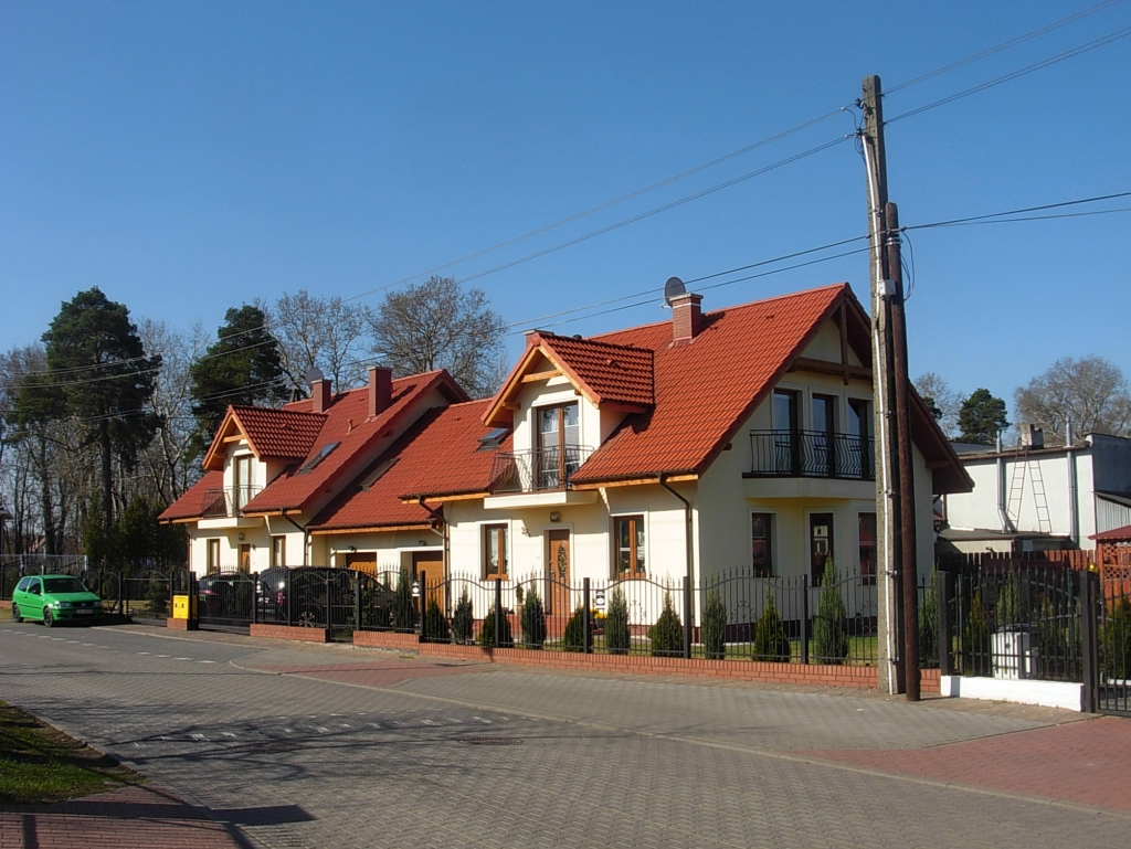 Zabudowa wzdłuż ulicy Wodnej na osiedlu Flisy w Bydgoszczy